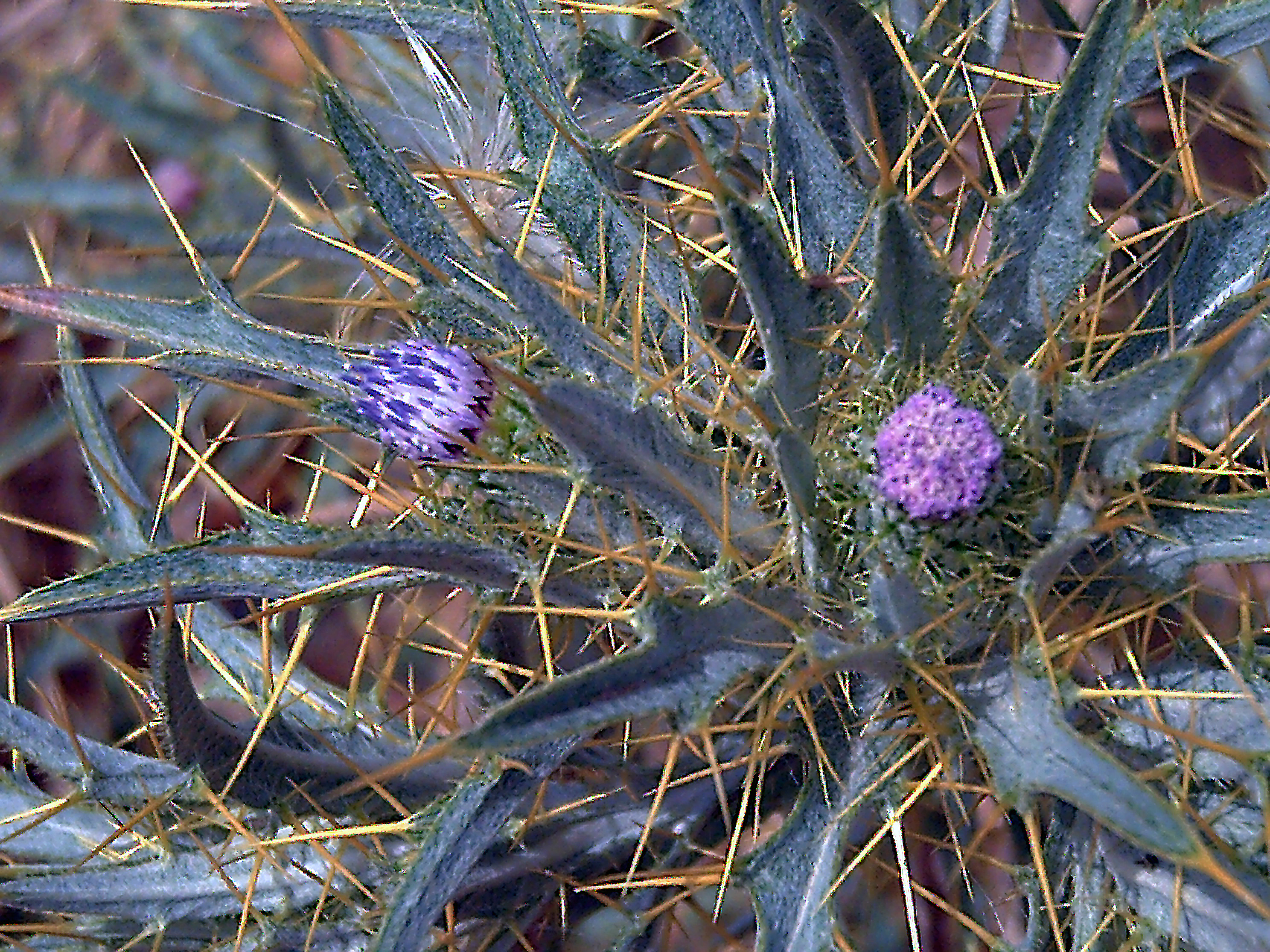 Picnomon acarna Inflorescence Close up Campo de Calatrava, Spain